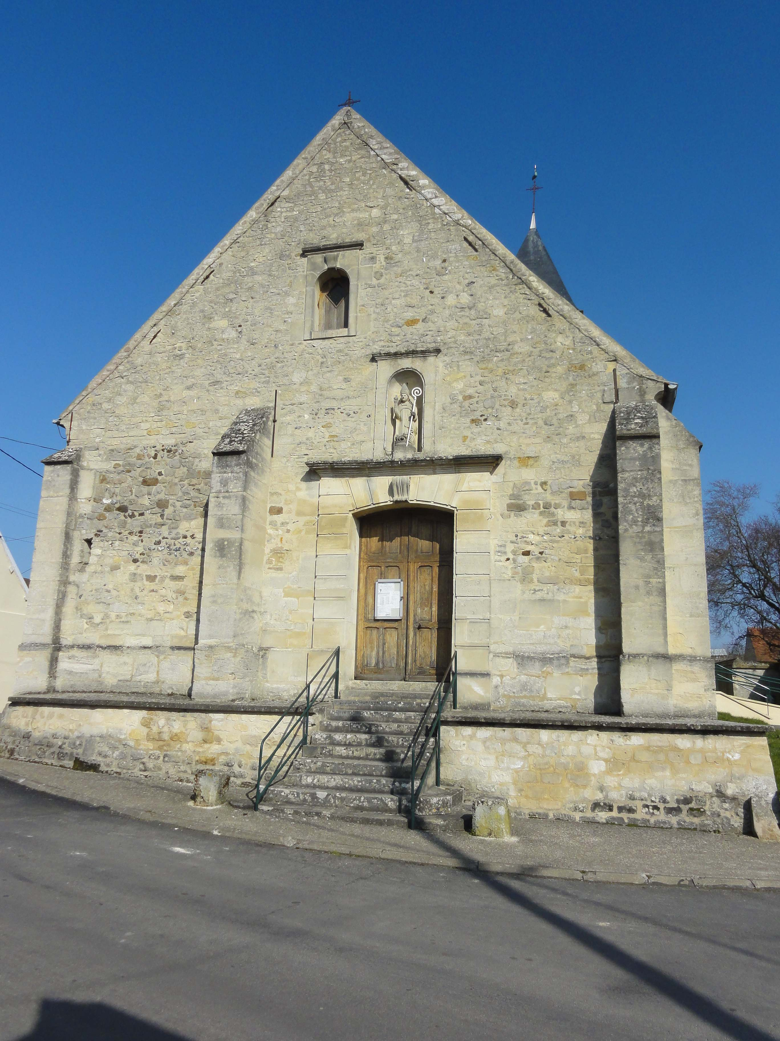 Église Saint-Nicolas de Fresnoy-en-Thelle - voir titre.